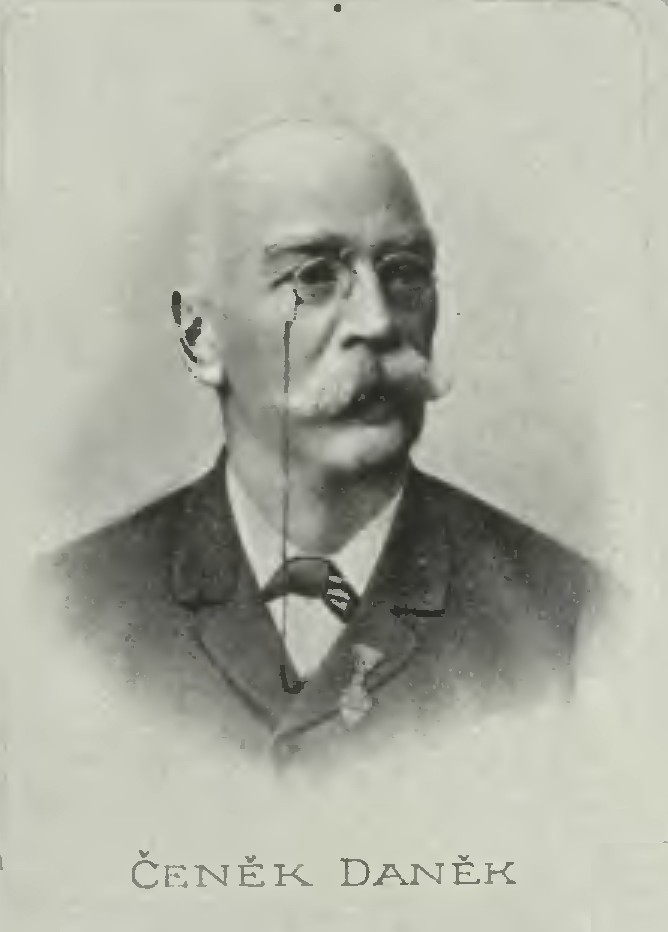 Portrét – Vincenc Daněk (1826-1893), Český konstruktér a průmyslník.